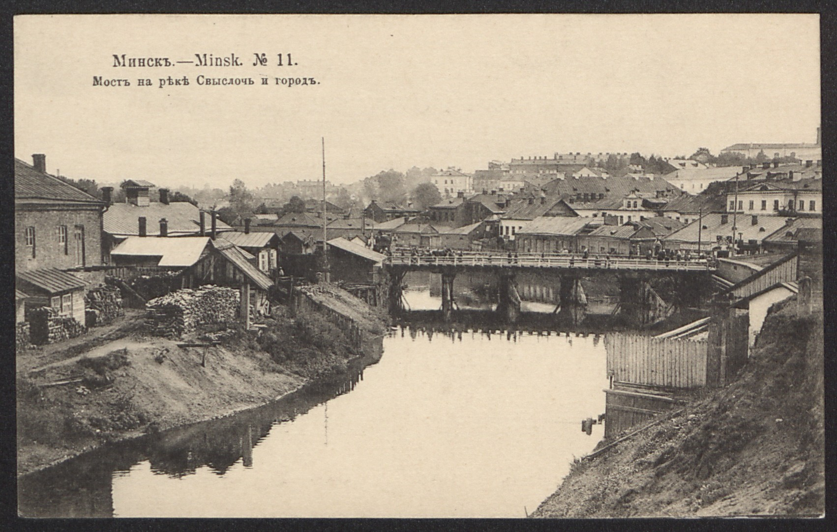 Беларуская (тарашкевіца): Менск (Miensk), рака Сьвіслач (Śvisłač), Хлусаў мост (Chłusaŭ most)